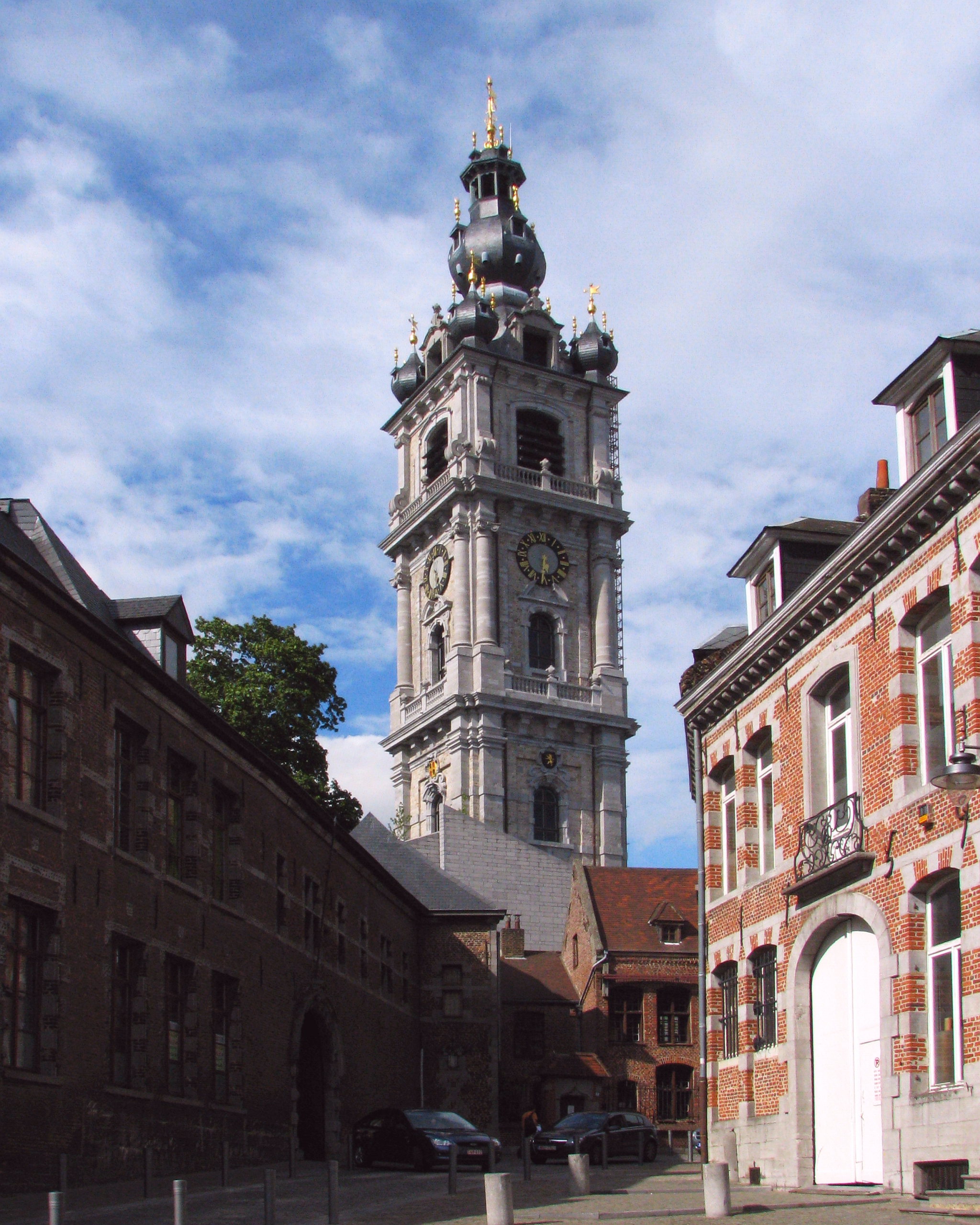 Beffroi Belfort - der barocke Belfried aus dem 17. Jh, H = 87m. Weltkulturerbe. „El catiau“ genannt in Mons in Belgien - Foto Wolfgang Pehlemann IMG_1683